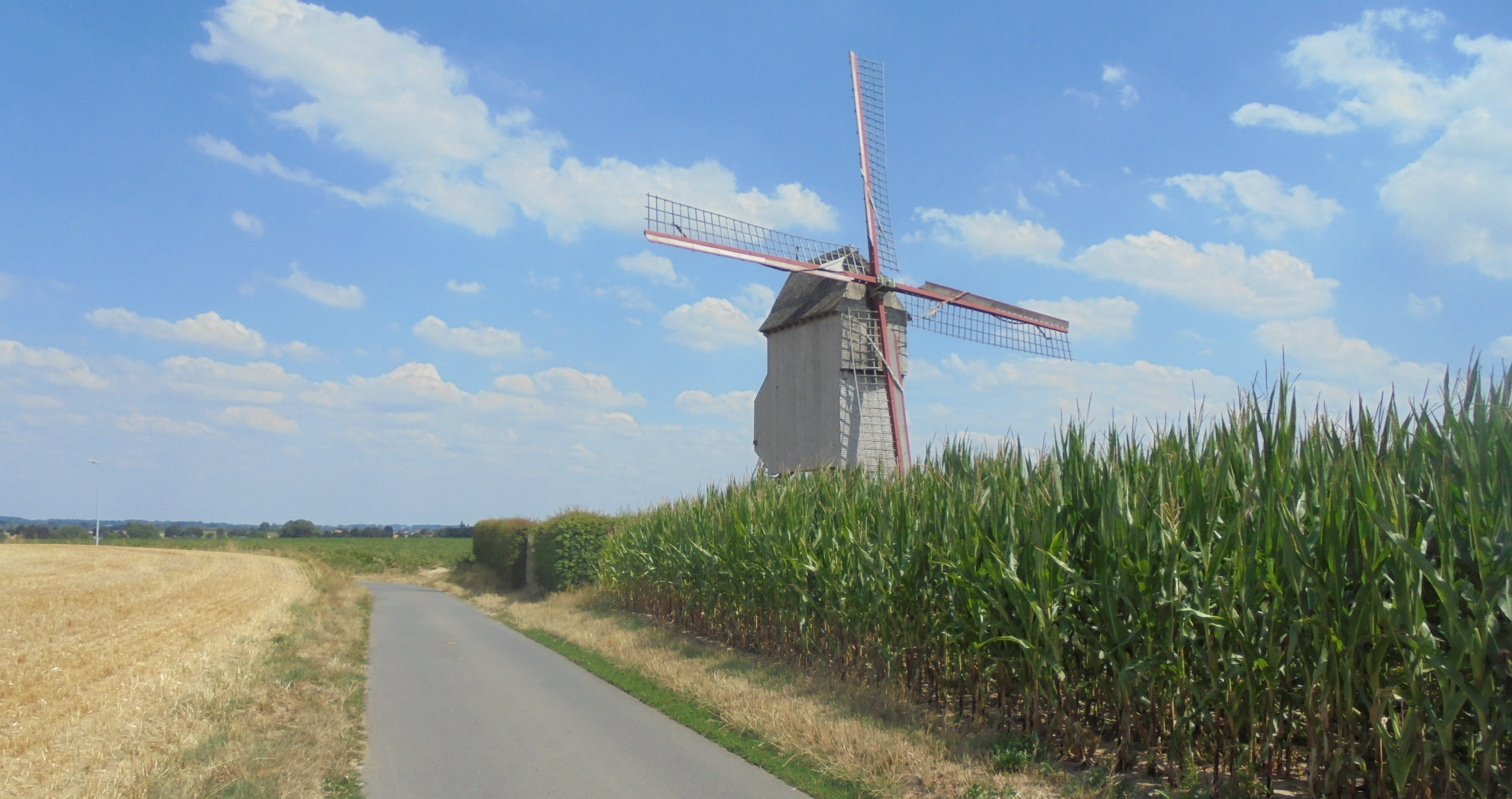 De Vinkemolen - Fransekouter - Sint-Denijs-Boekel - Zwalm - Oost-Vlaanderen - België